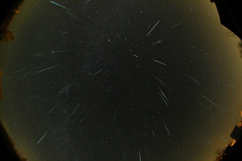 Geminidák meteorraj maximuma (Ludányhalászi)